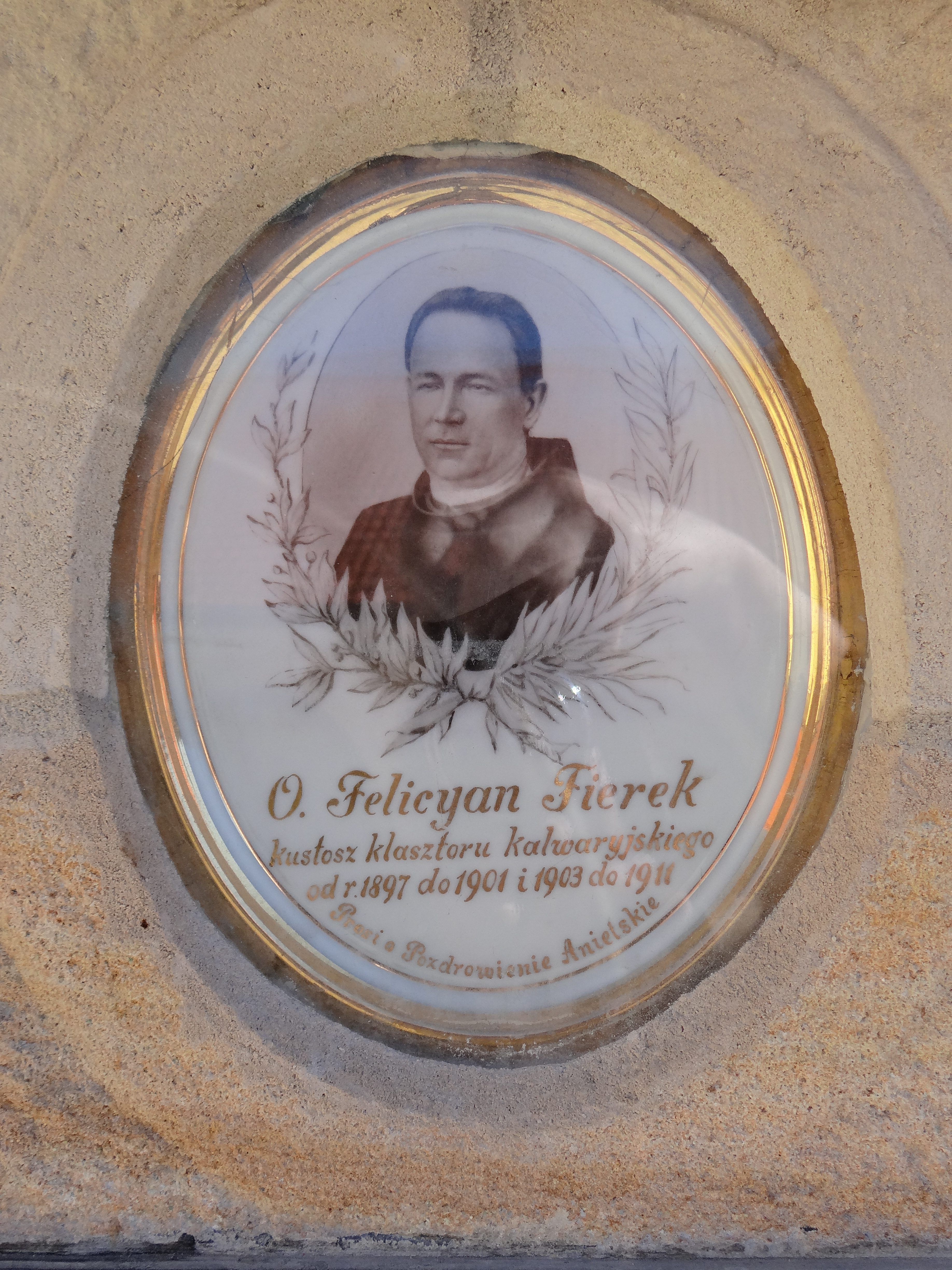 Małopolska. Kalwaria Zebrzydowska. Zespół klasztorny bernardynów. Fotografia nad tablicą nagrobną w murze kościoła.